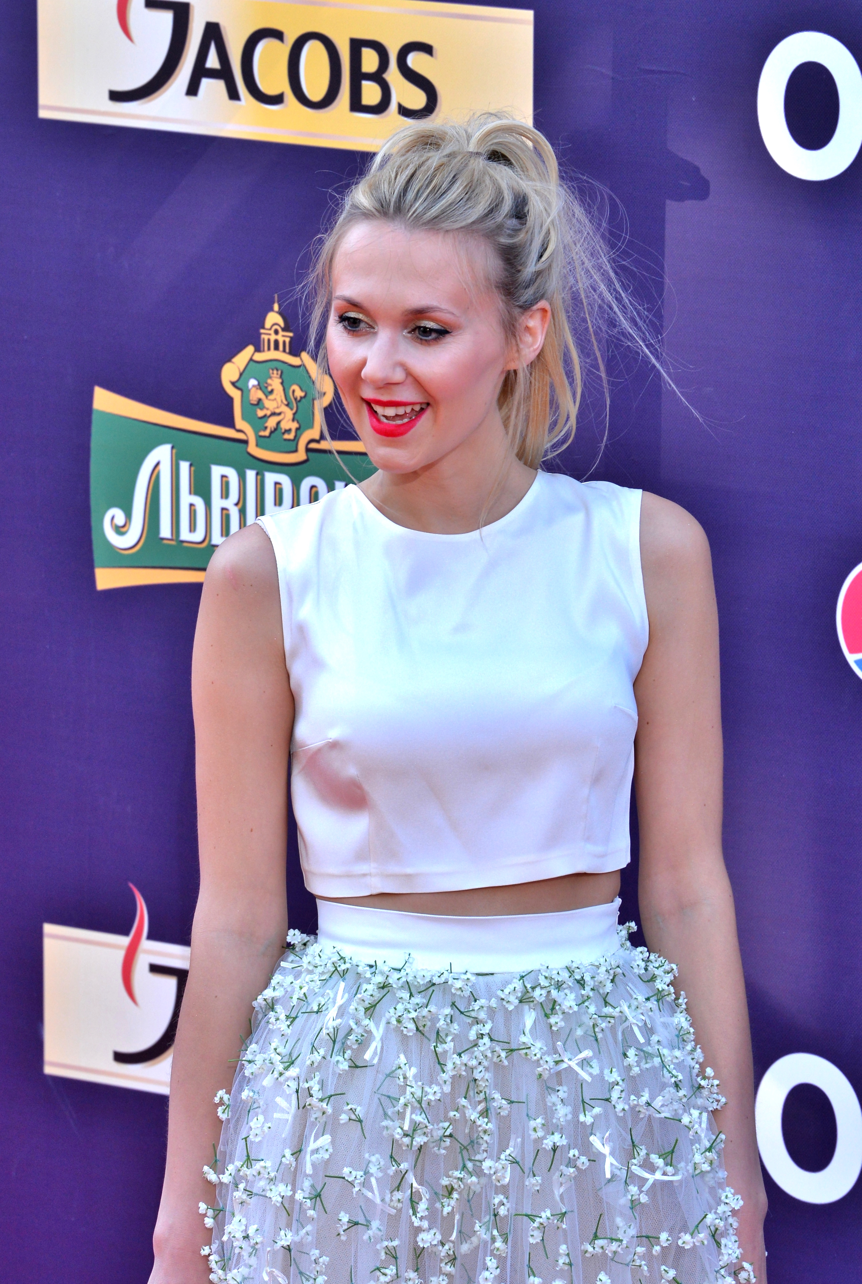 Польська співачка Кася Мось на церемонії відкриття пісенного конкурсу Євробачення 2017 у Києві